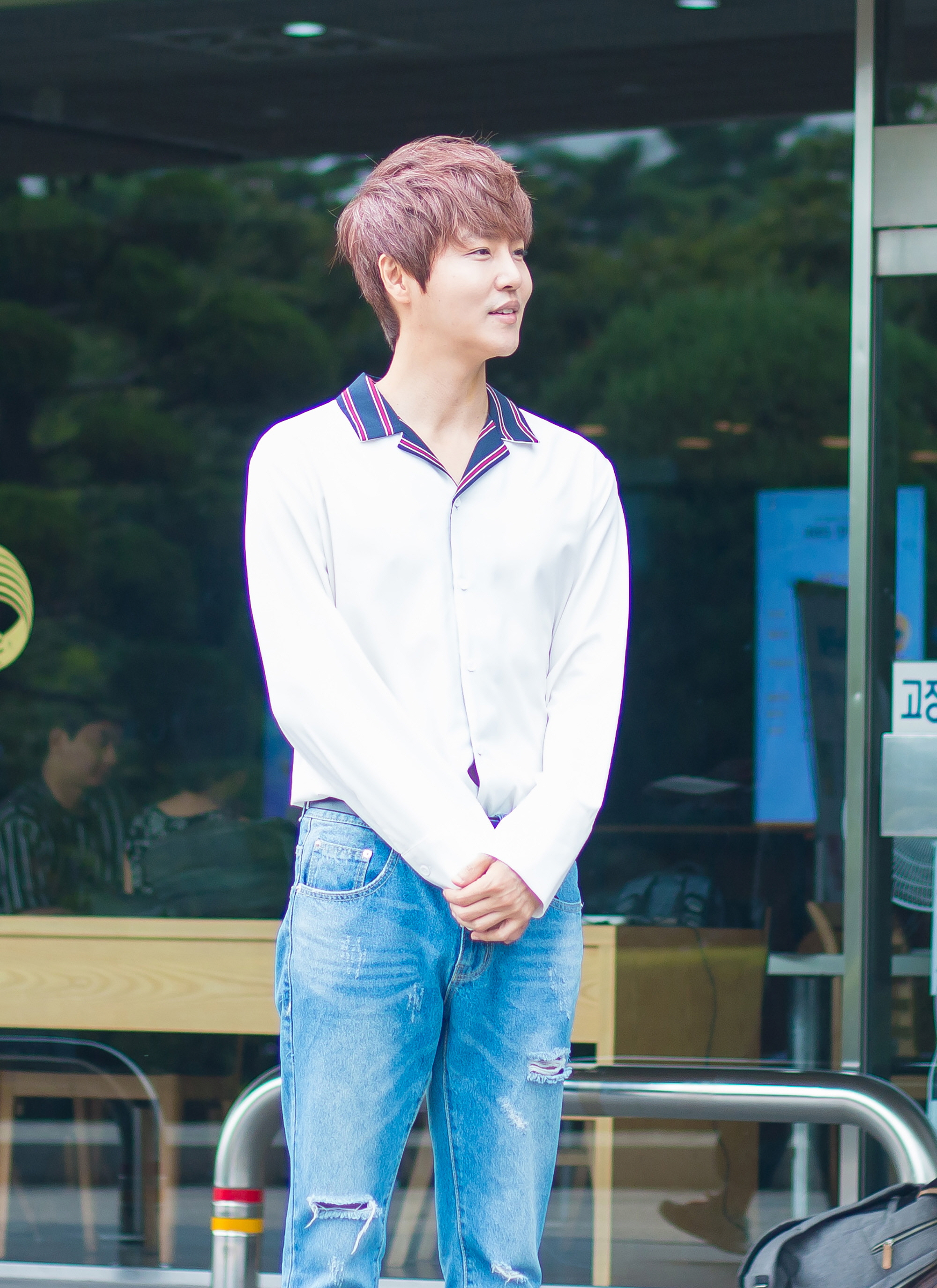 20170819 해피투게더 출근길